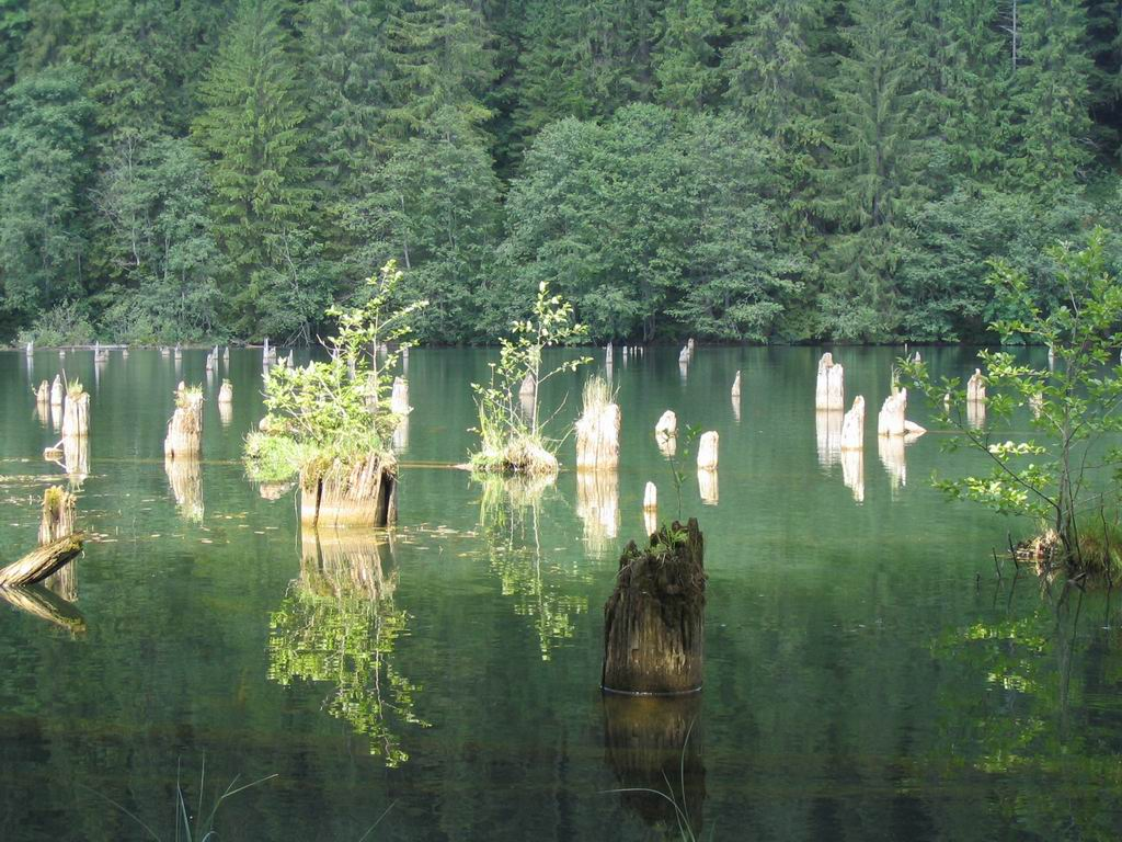 Gyilkos-tó egy természetes torlasztó, România-Hargita megye észak-keleti részén, a Hagymás-hegységben.